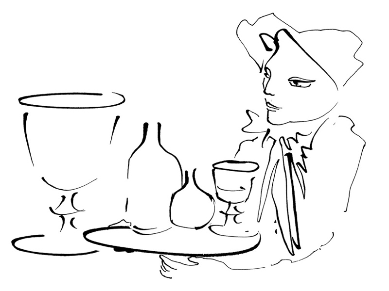 Alain Le Yaouanc - Dessin à l'encre de Chine, 2006 (21 x 29,7 cm), sur le thème du 18ème siècle. Couverture de la carte des vins du Restaurant 1728 à Paris.